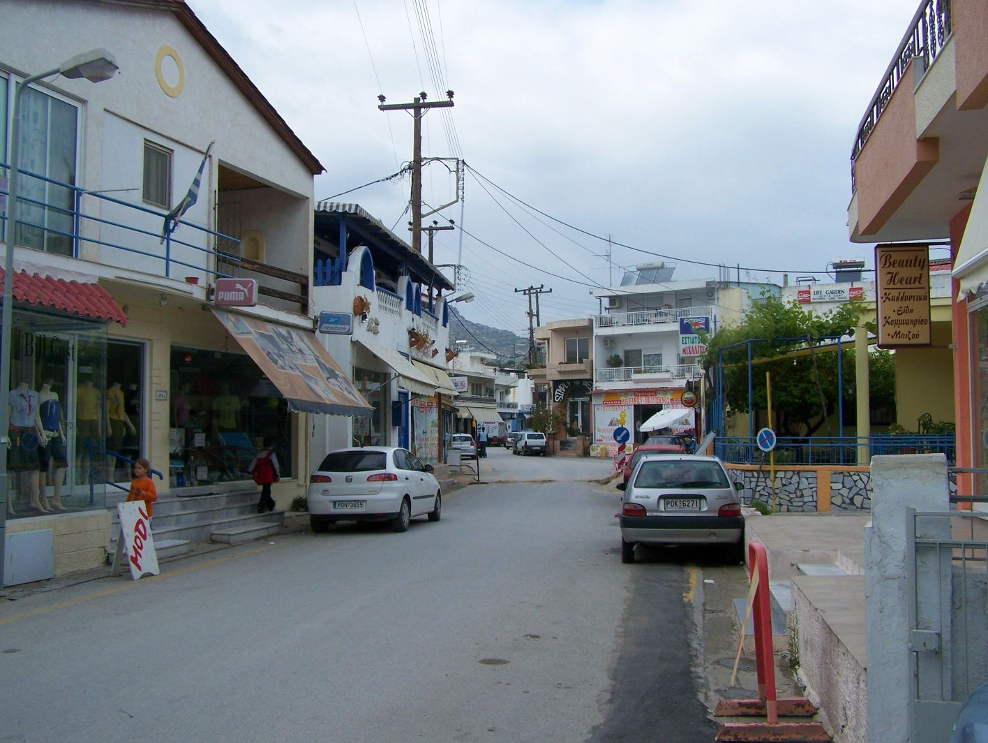 Straße in Afandou